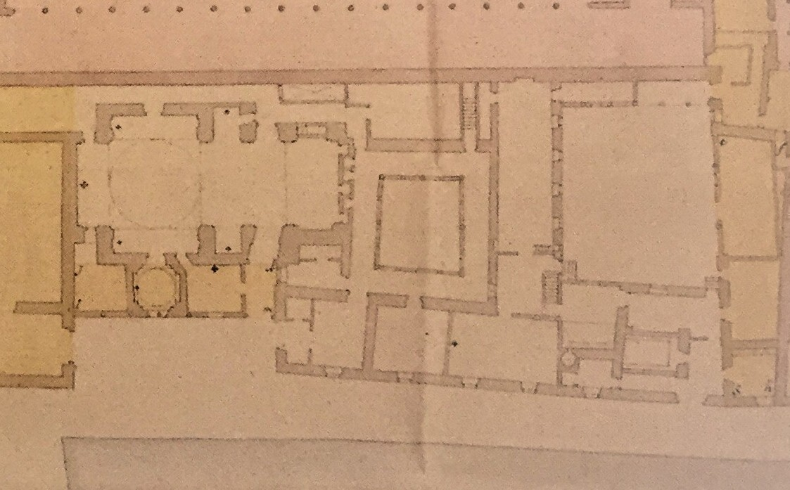 Planta de una parte del Palacio Real de Valladolid